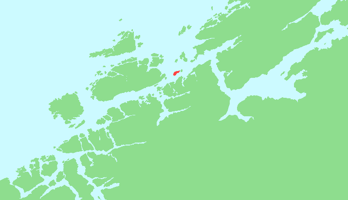 Locator map of Sørleksa, Sør-Trøndelag, Norway